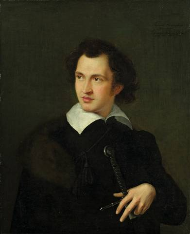 Portrait of Ludwig Hassenpflug (1794-1862)